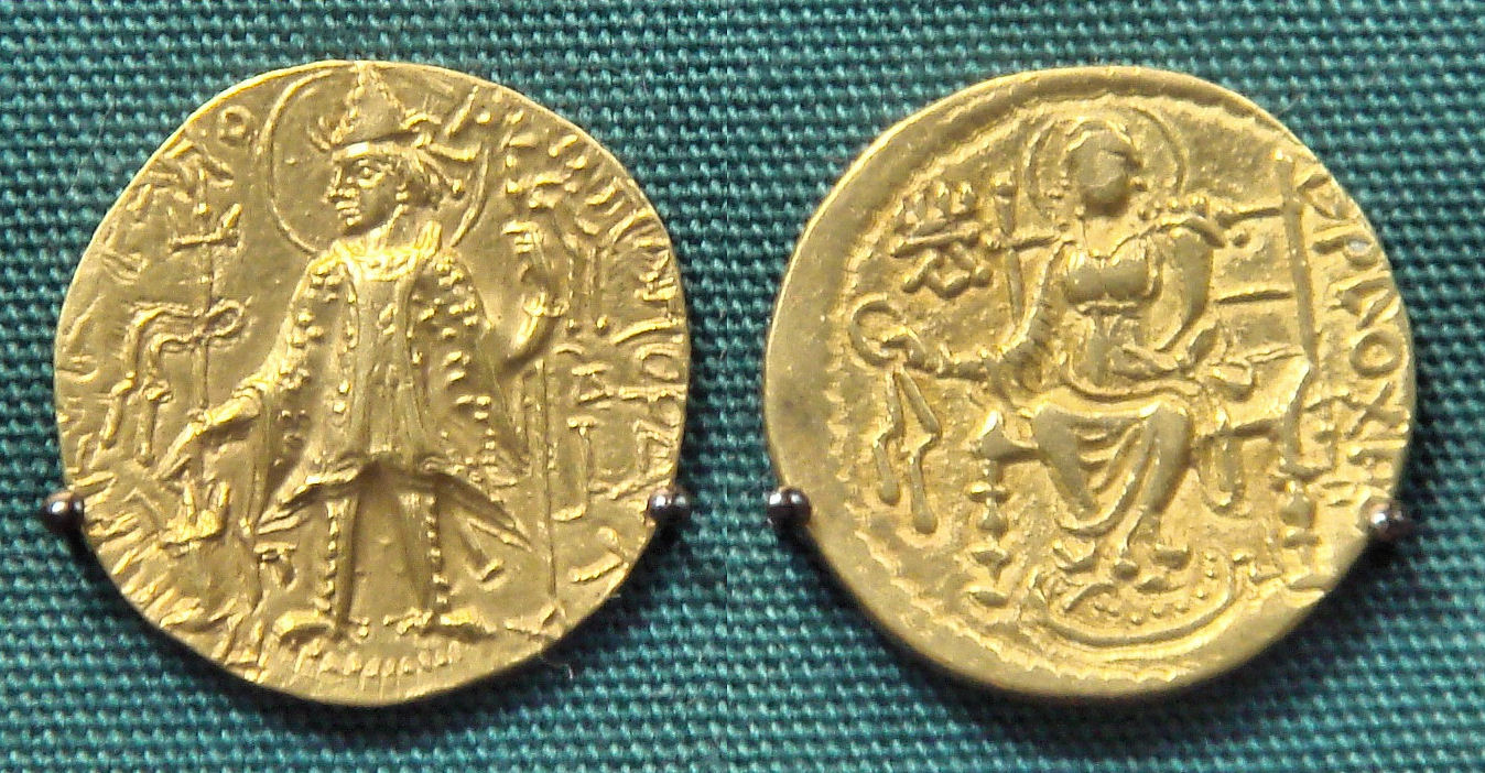 Kanishka II With Ardoksho